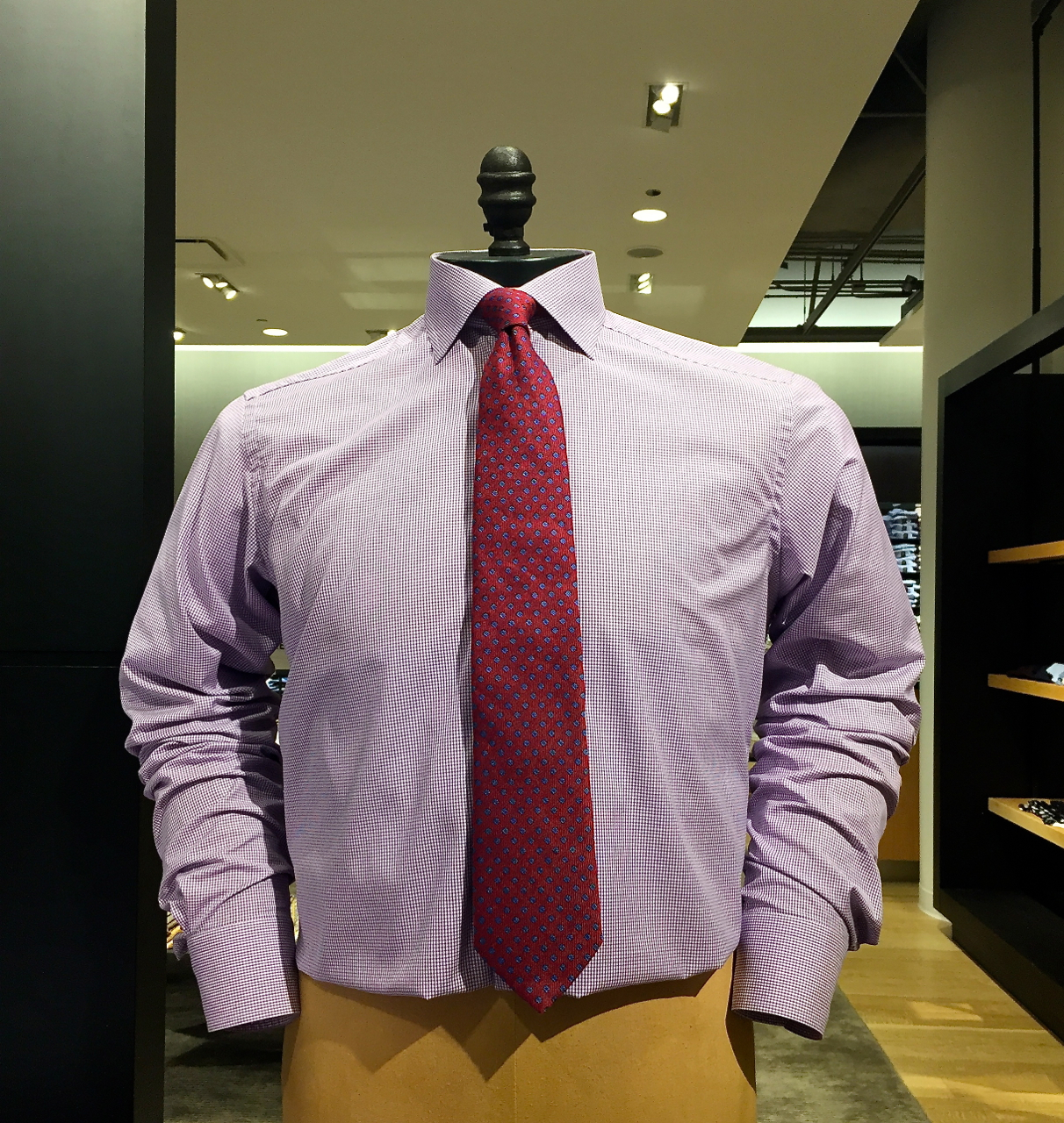 Skjorta från den svenska skjorttillverkaren Eton i Gånghester. Tašlḥiyt/ⵜⴰⵛⵍⵃⵉⵜ: Shirt made by the Swedish manufacturer Eton in Gånghester.